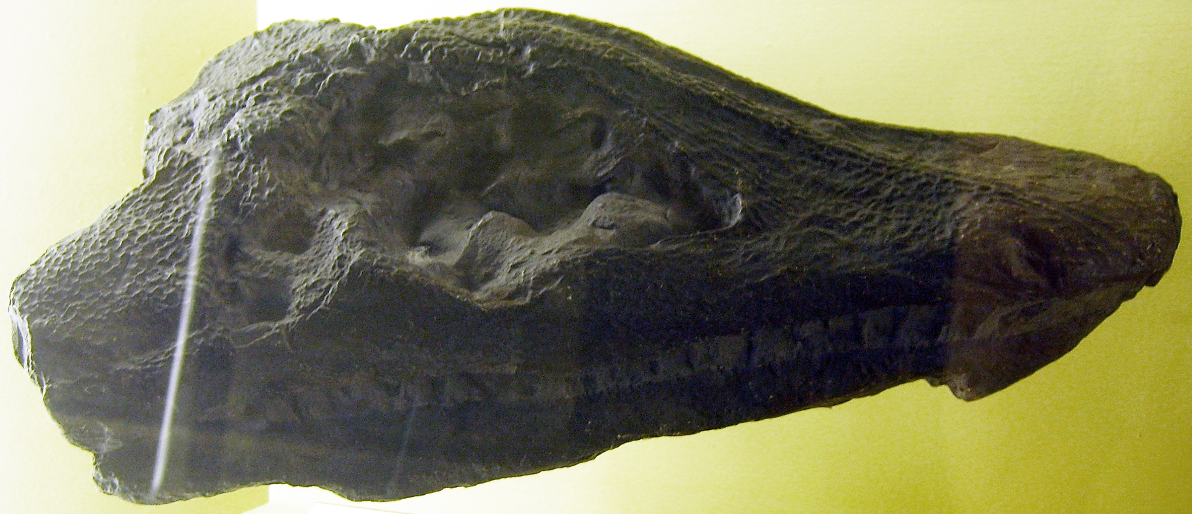 Loxomma allmanni skull cast at the Museum für Naturkunde, Berlin.